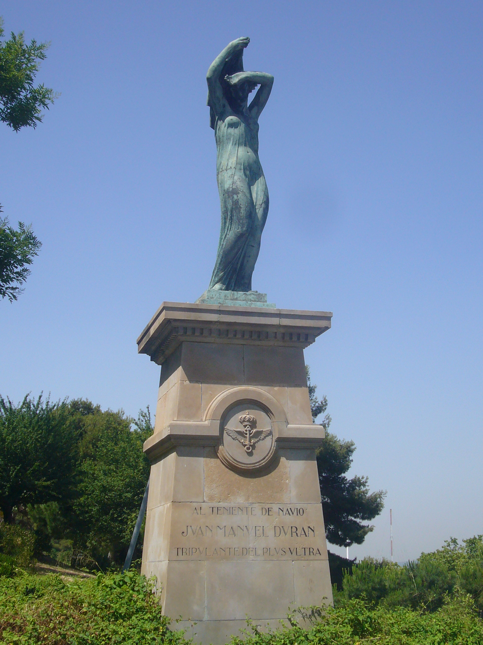 Monument a Juan Manuel Durán González, a Montjuïc